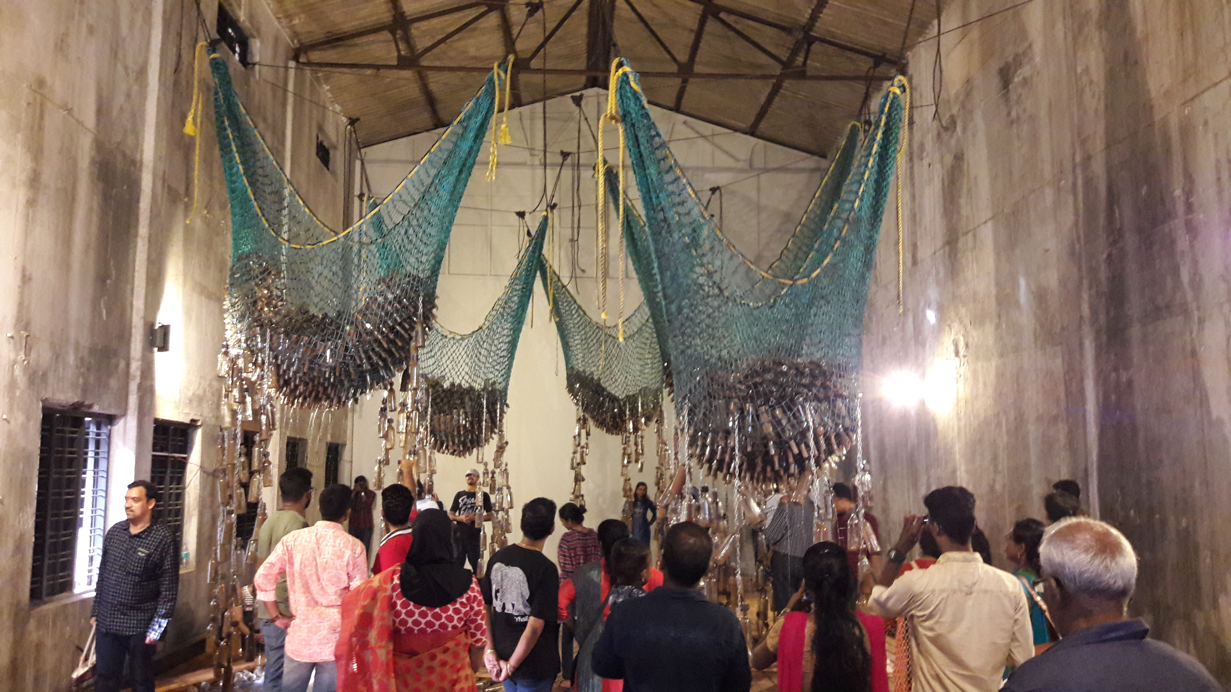 സ്യൂ വില്യംസൺ കൊച്ചി മുസിരിസ് ബിനലെയിൽ അവതരിപ്പിച്ച പ്രതിഷ്ഠാപനം കാണുന്നവർ